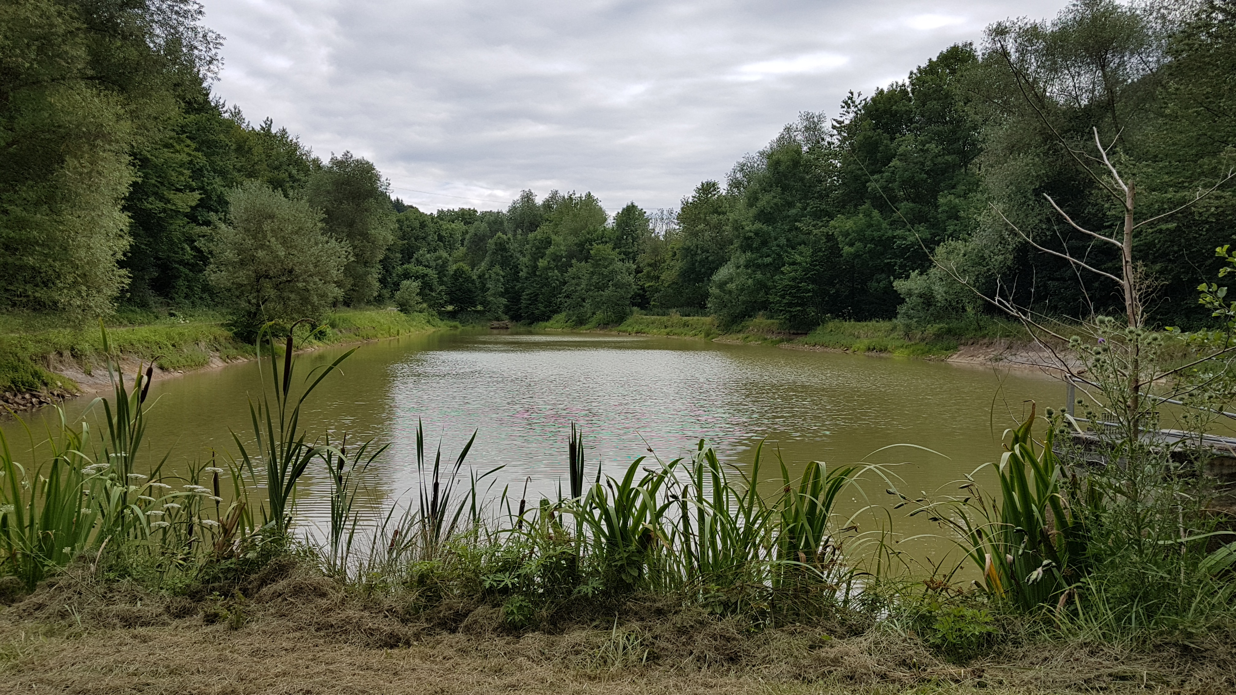 Dittwarer See